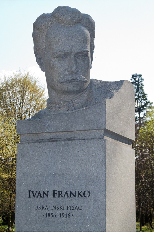 Lipik Ivan Jakovič Franko